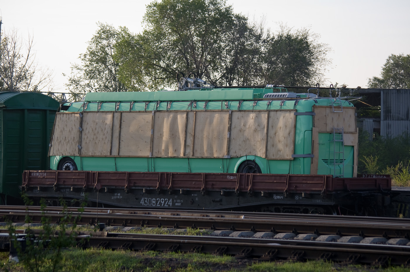 Новый троллейбус прибыл на ж.д. станцию Тирасполь.